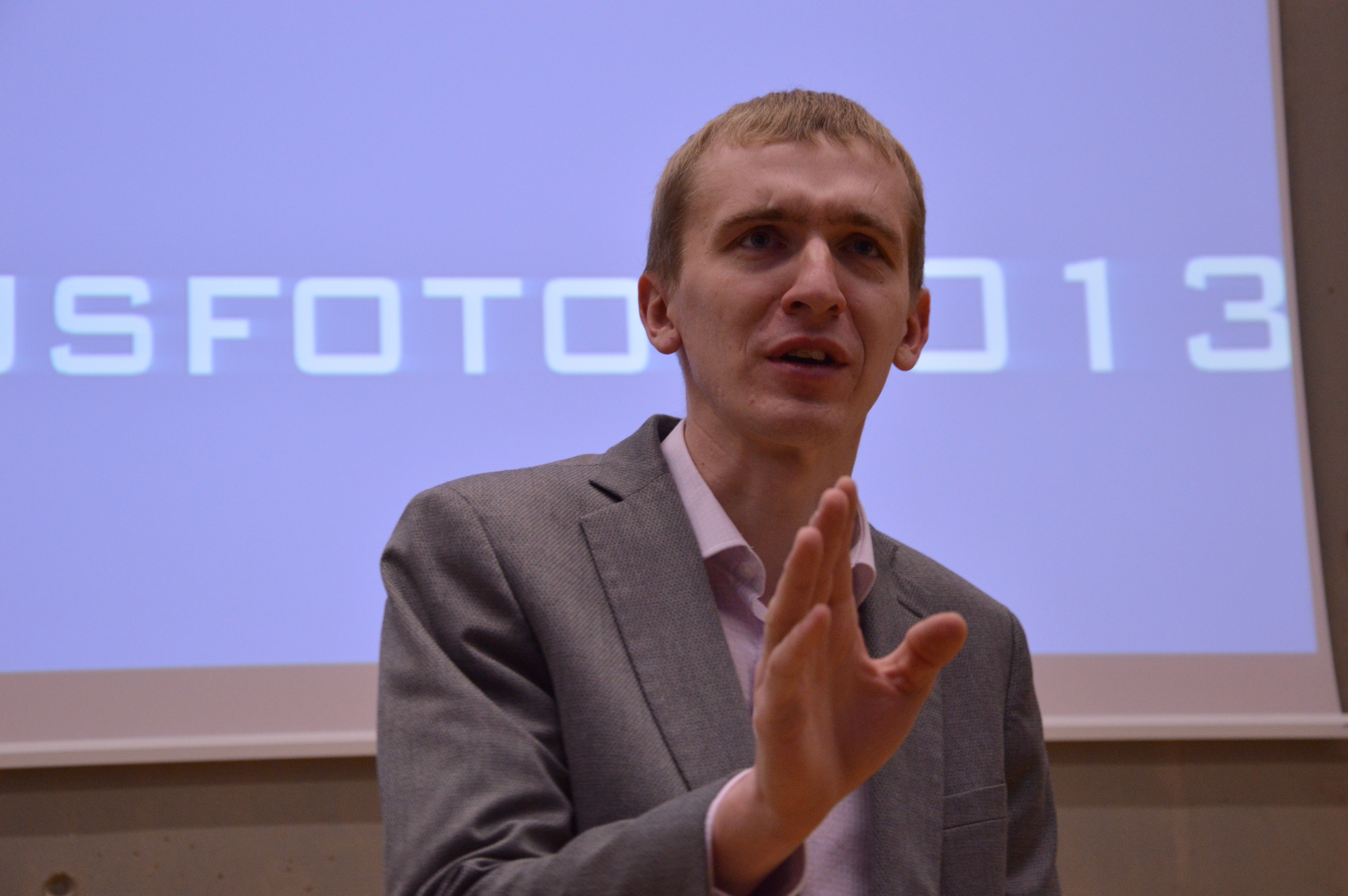 Andres Juur kõnelemas Teadusfoto 2013 lõpuüritusel.